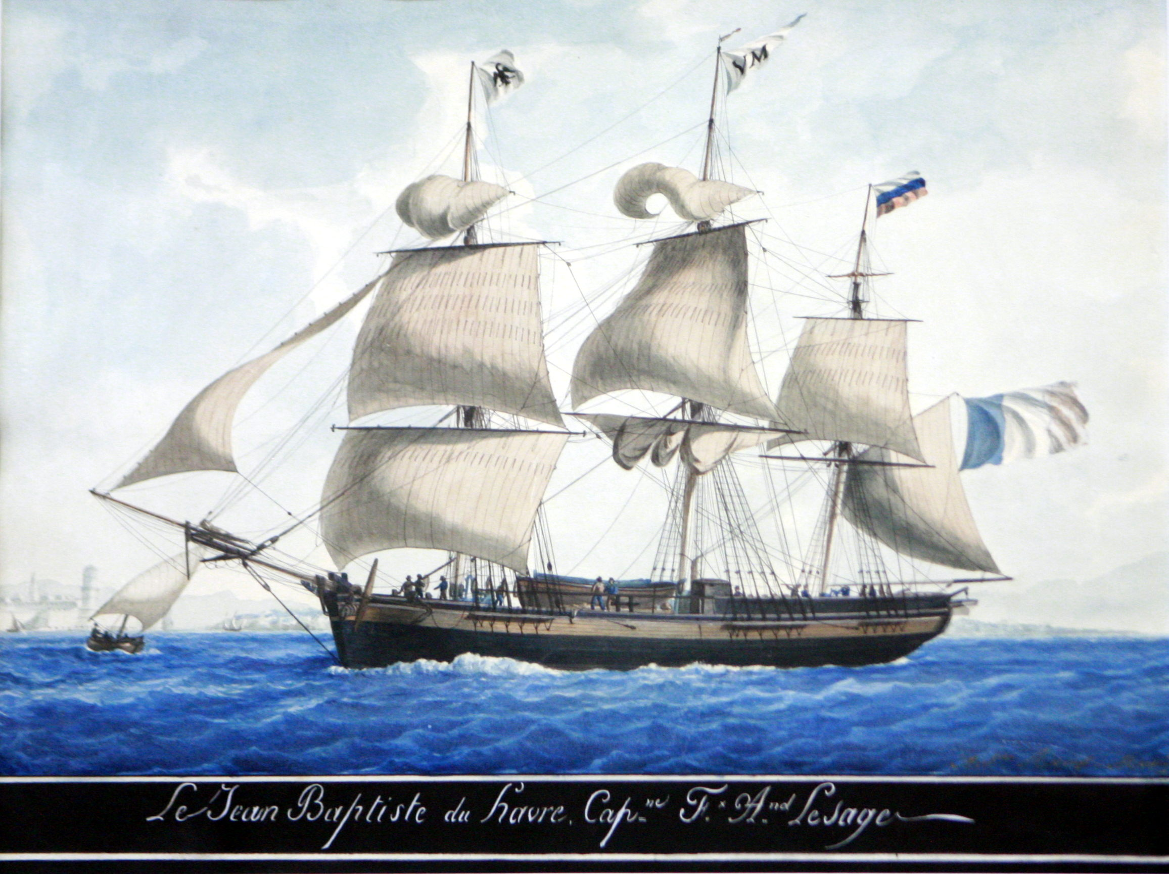 Marseille naval museum Jean-Baptiste du Havre in Marseille harbour Watercolour by Ange-Joseph Antoine Roux (1765-1835)